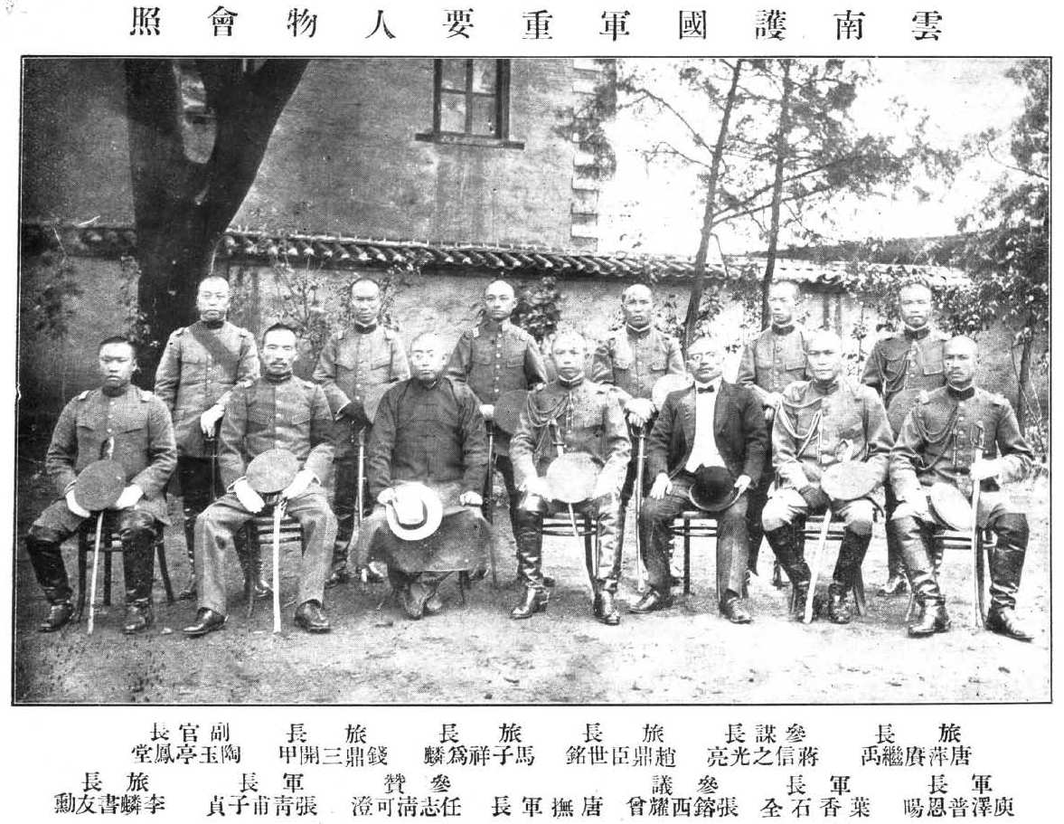 《雲南首義擁護共和始末記》相關圖片。雲南護國軍重要人物會照。前排右起：庾恩暘、葉荃、張耀曾、唐繼堯、任可澄、張子貞、李友勳。後排右起：唐繼禹、蔣光亮、趙世銘、馬爲麟、錢開甲、陶鳳堂。